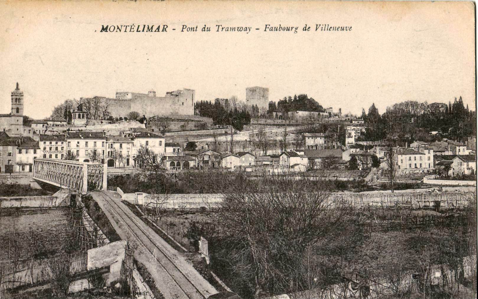 Carte postale ancienne éditée par Budane à Montélimar : MONTÉLIMAR - Pont du Tramway - Faubourg de Villeneuve